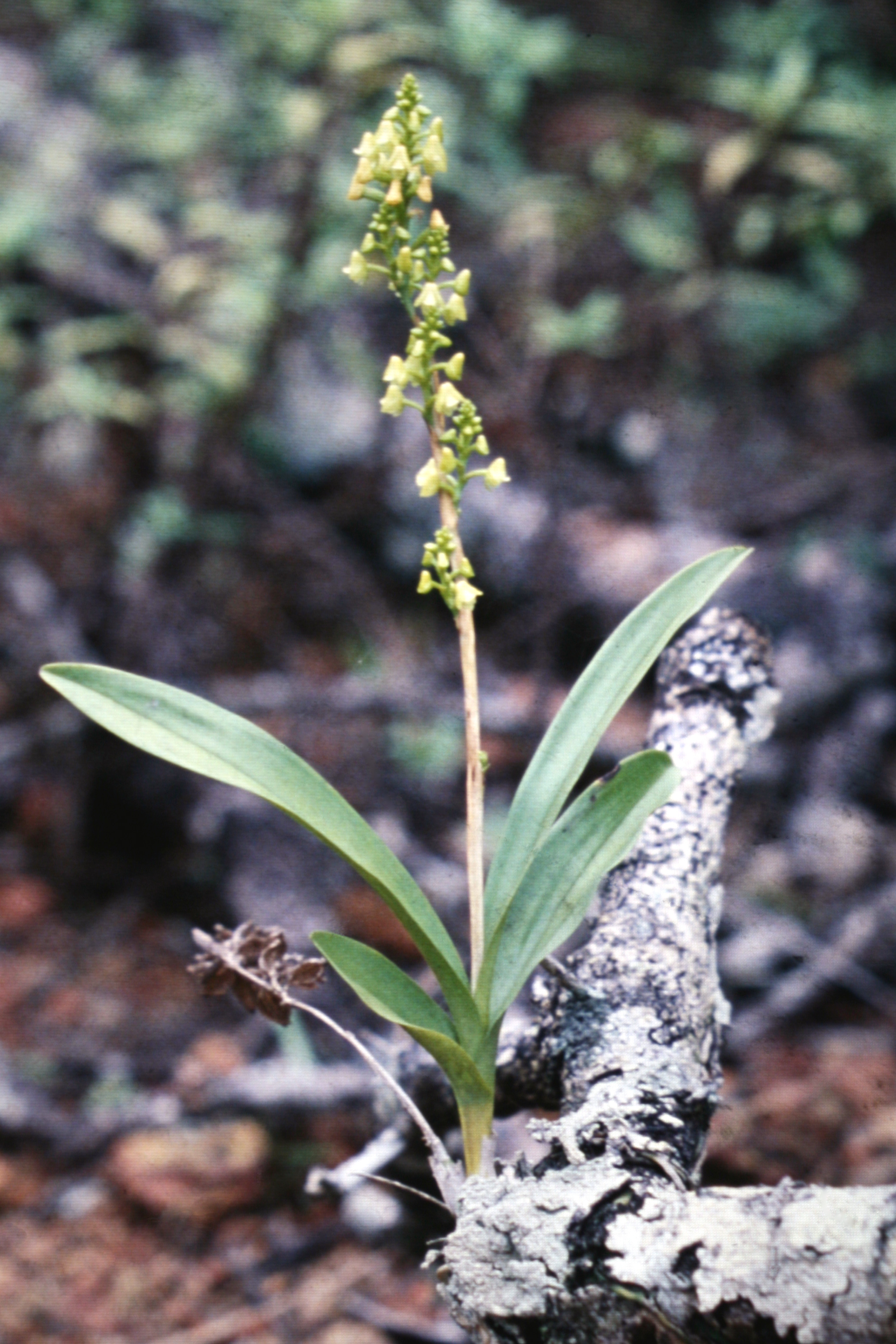 Polystachya concreta, Suriname.